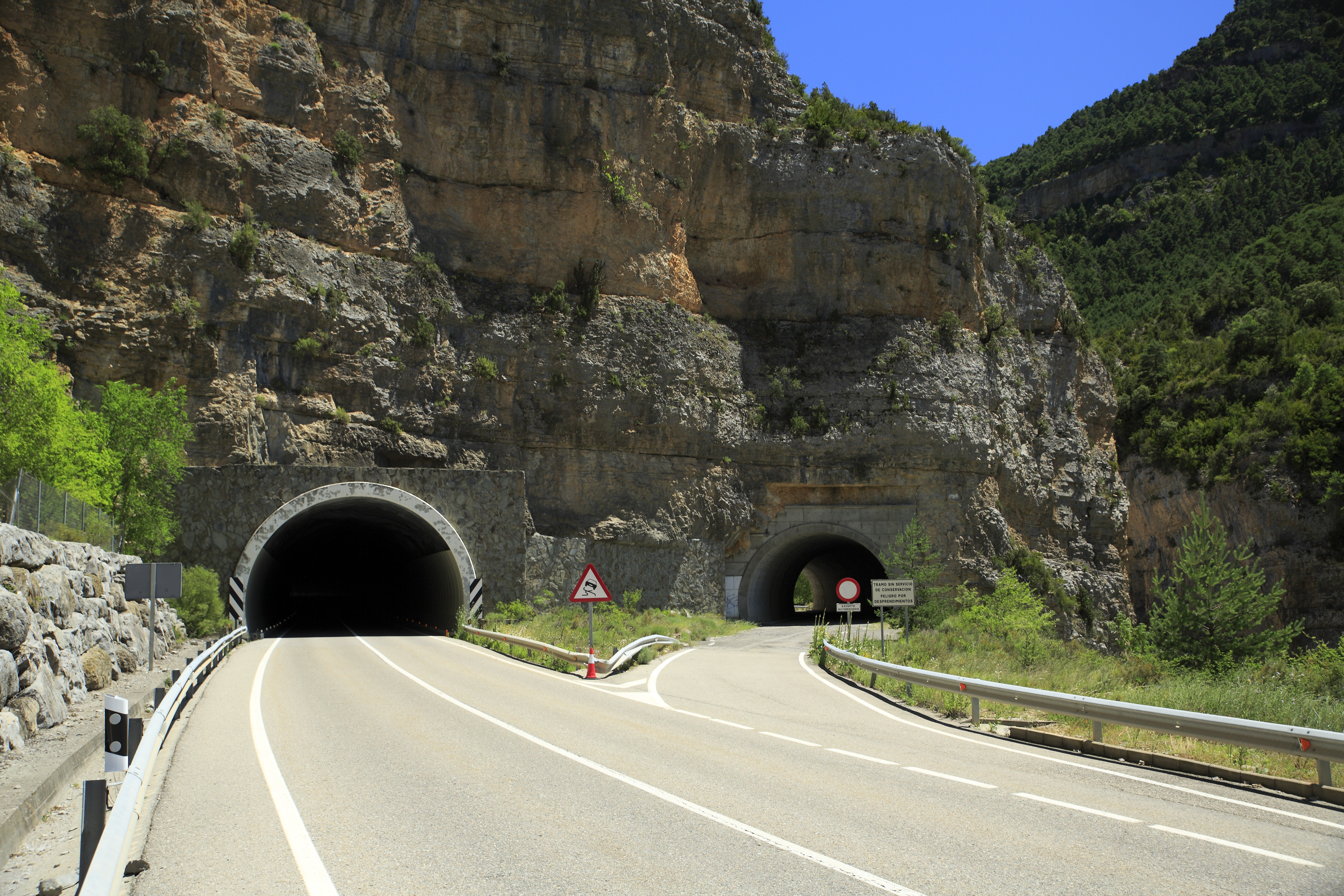 »Túnel de Balupor«, Westortale. Mit den neuen, deutlich längeren Tunnel links wurde die Eje Pirenáico N-260 vom Río Ara wegverlegt und ein steinschlaggefährdete Abschnitt umgangen. Das Schild an der alten Straße besagt »Abschnitt ohne Unterhaltung, Steinschlaggefahr«